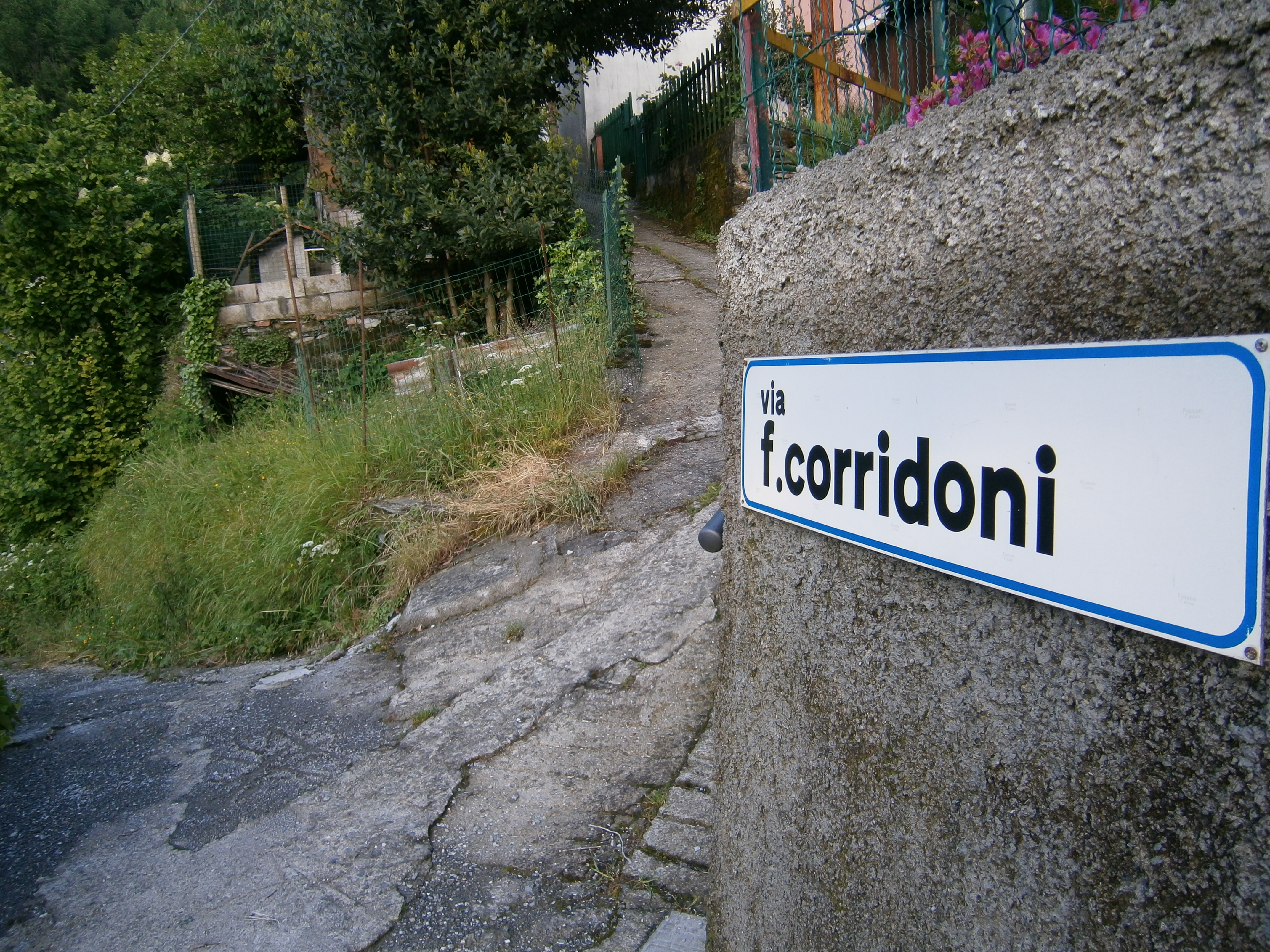 La Via F. Corridoni a Bargagli.